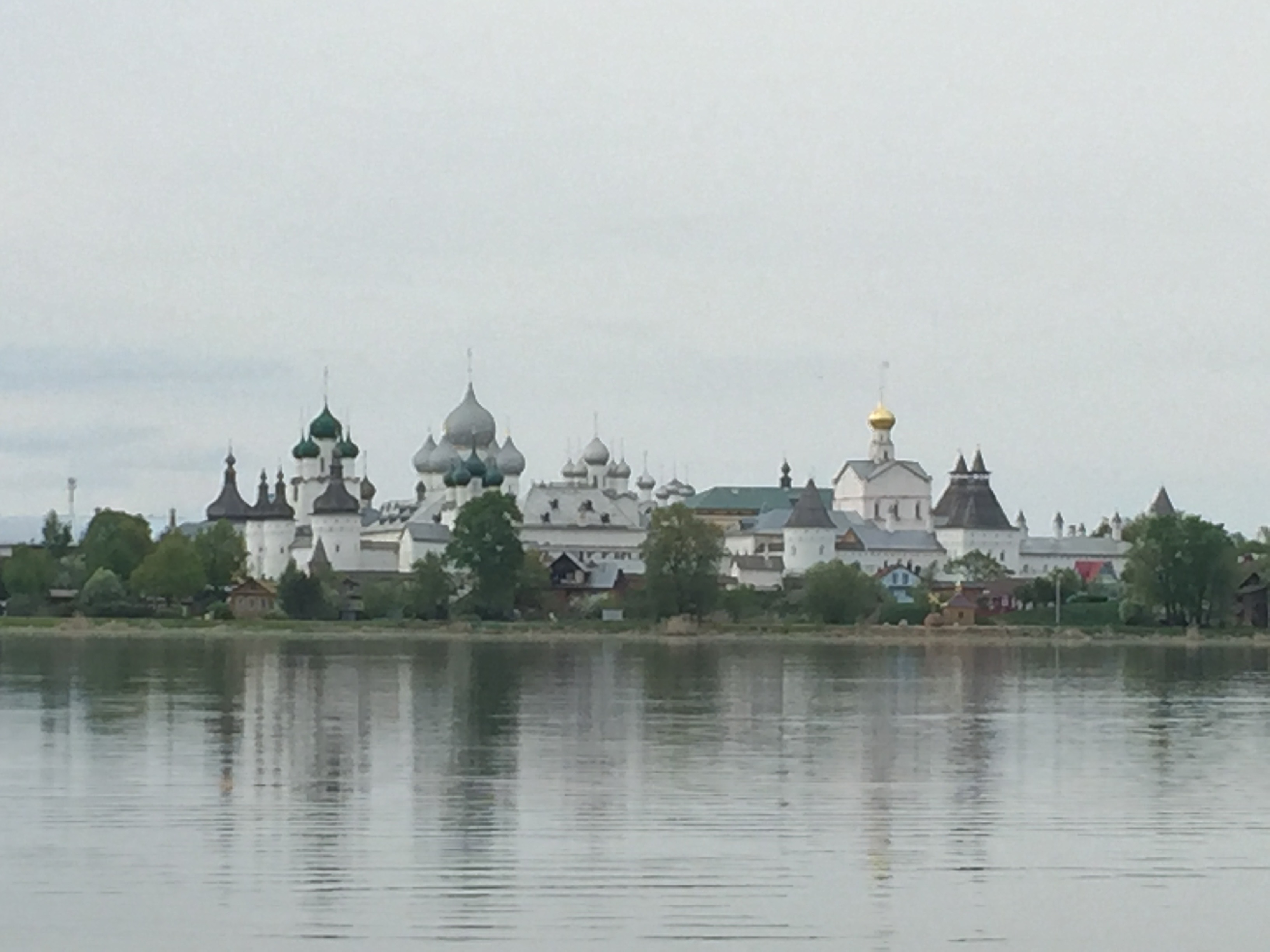 Rostow